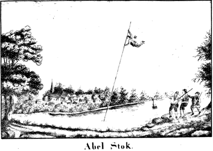 Afbeelding van 'Abel Stok'.